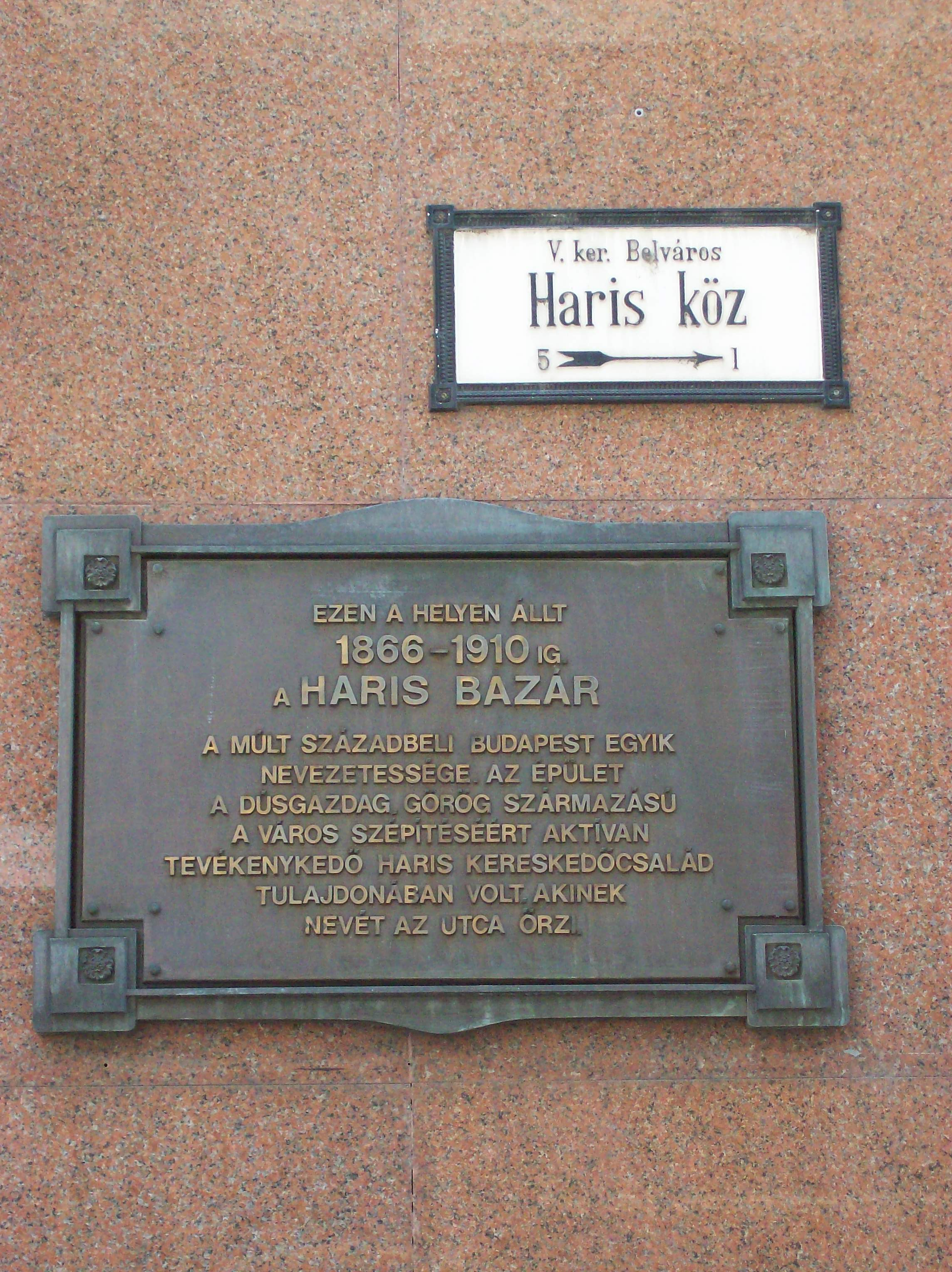 A Haris-bazár emléktáblája Budapest V. kerületében. Haris köz 5.